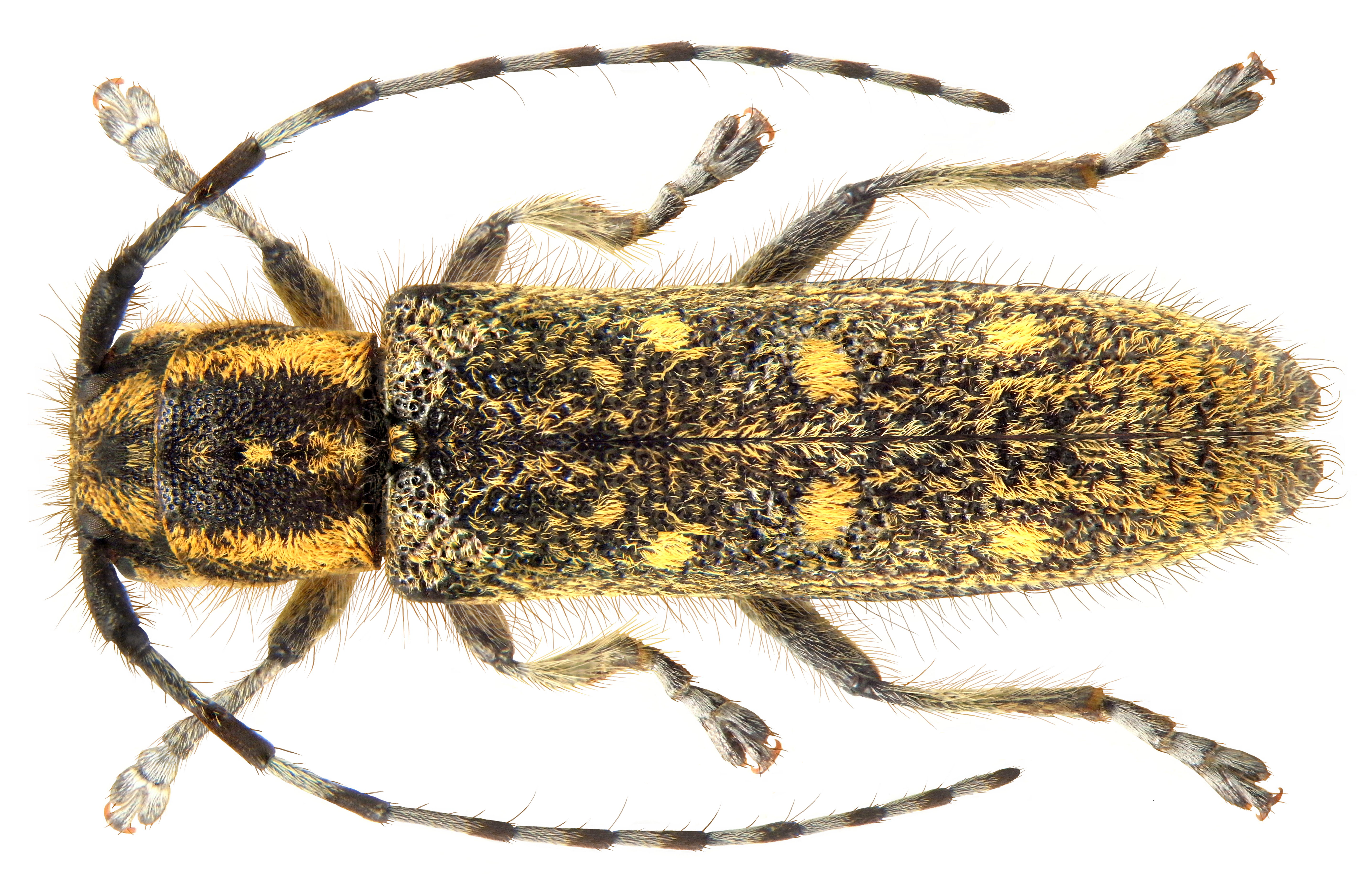 Familie: Cerambycidae Groesse: 9-15 mm Verbreitung: Europa Oekologie: Entwicklung in Laubholz, besonders in Populus tremula Fundort: Germania, Bayern, Oberfranken, Kulmbach leg.det. U.Schmidt, 1972 Photo: U.Schmidt, 2010